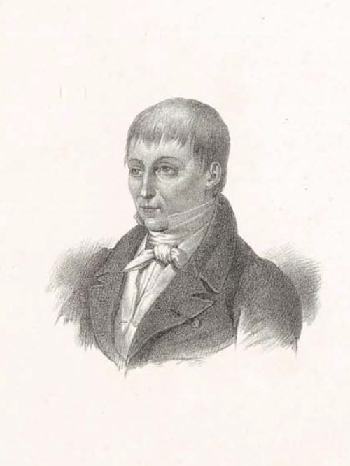 Dal Dizionario biografico degli uomini illustri di Sardegna di Pasquale Tola, 1837